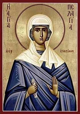 Santa Pelágia, a Penitente